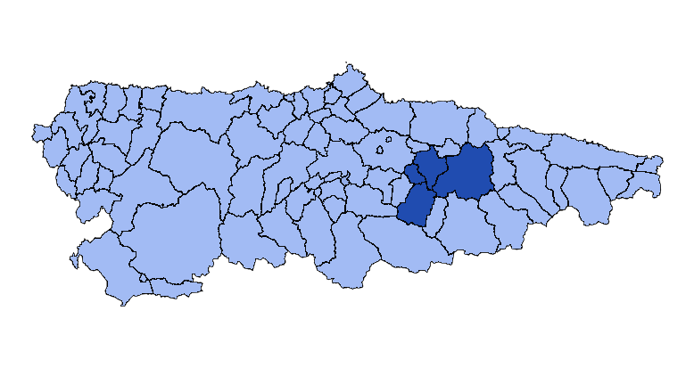 Concejos que forman la mancomunidad asturiana de Montes de Peñamayor